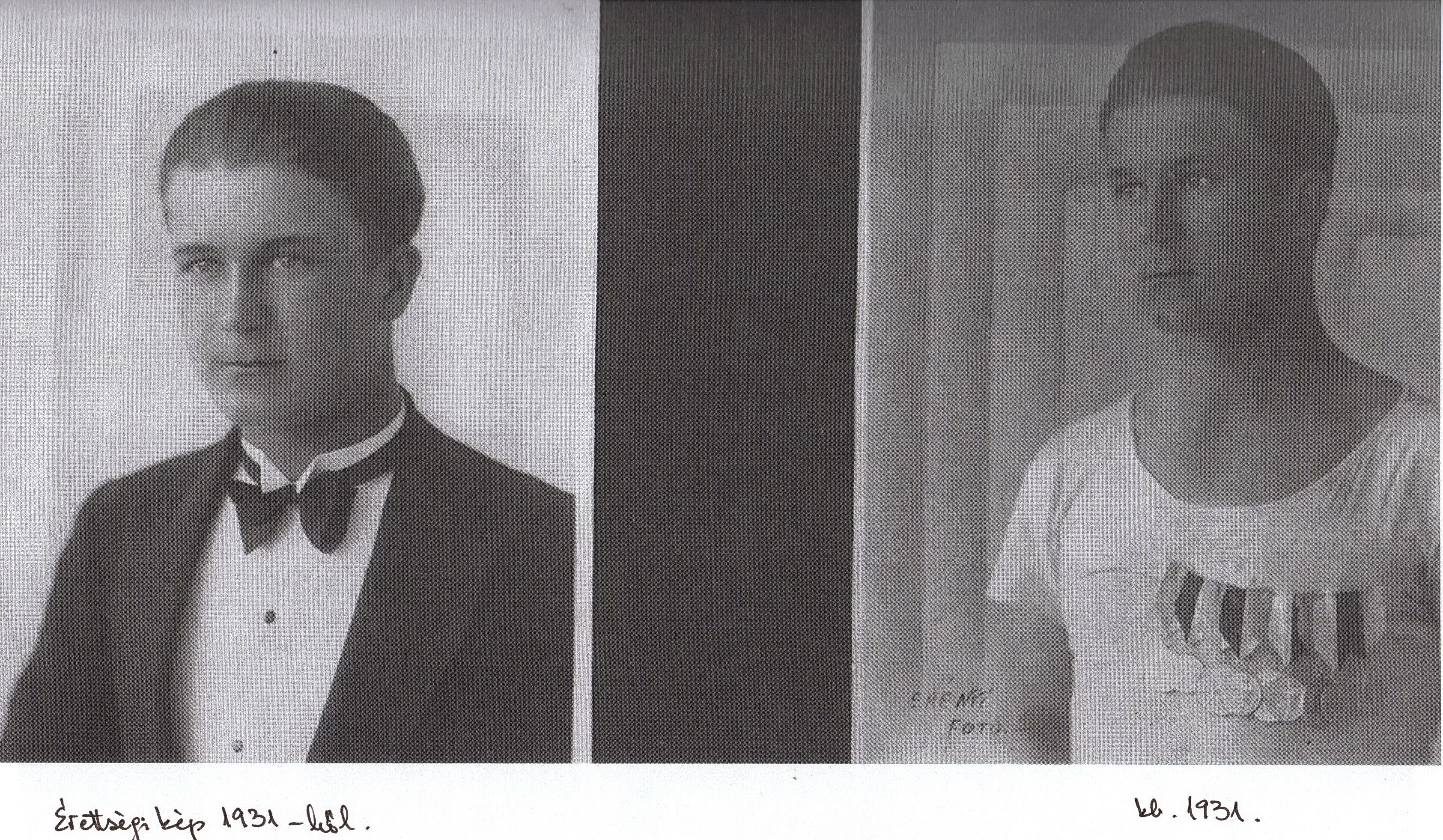 fotografie Bacalaureat 1931 fotografie medalii